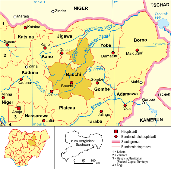 Politische Karte Nigerias (Bundesstaat Bauchi hervorgehoben)